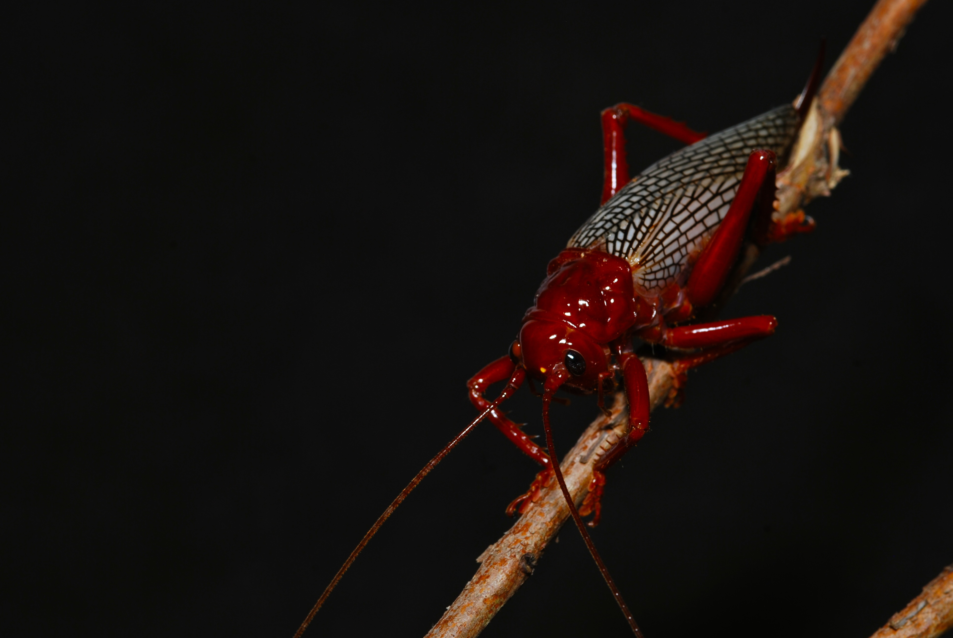 Taman Negara NP, Pahang, MALAYSIA